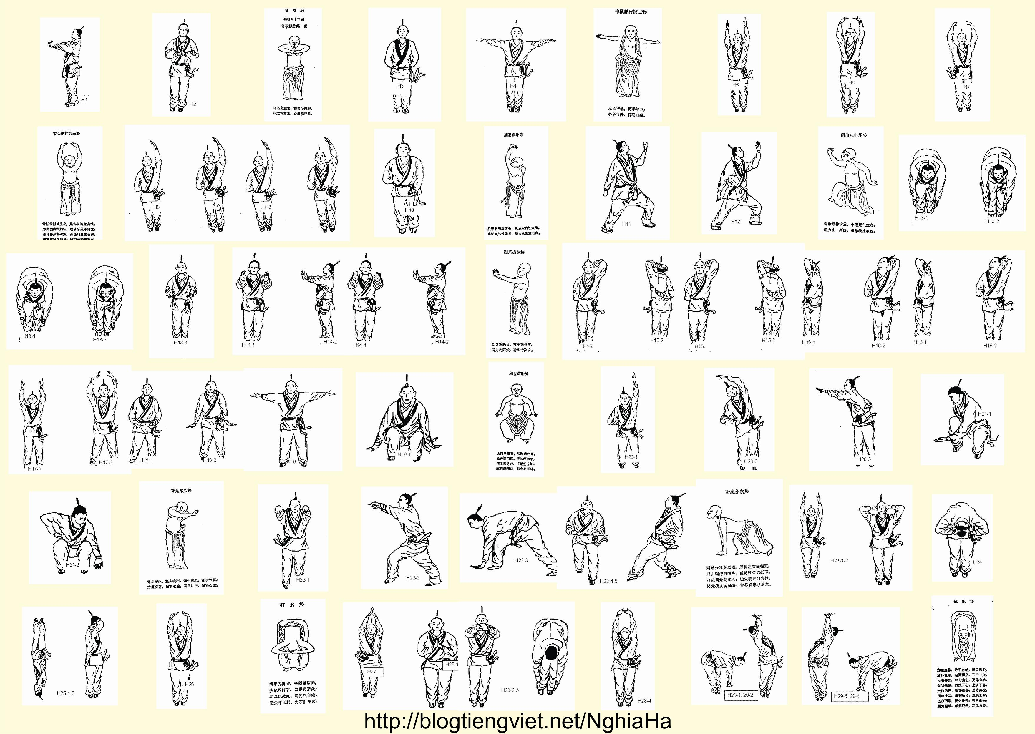 Dịch cân kinh, Yì Jīn Jīng